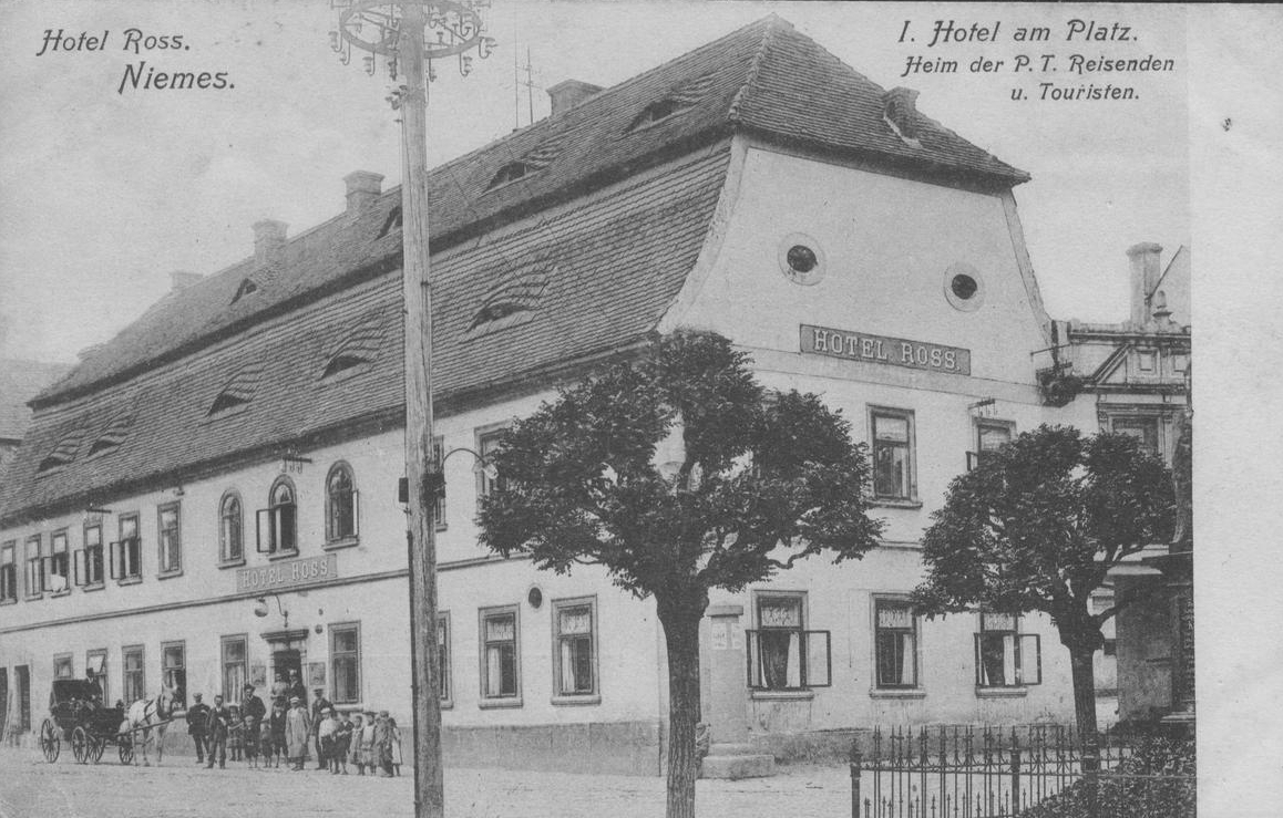 Hotel Ross Mimoň